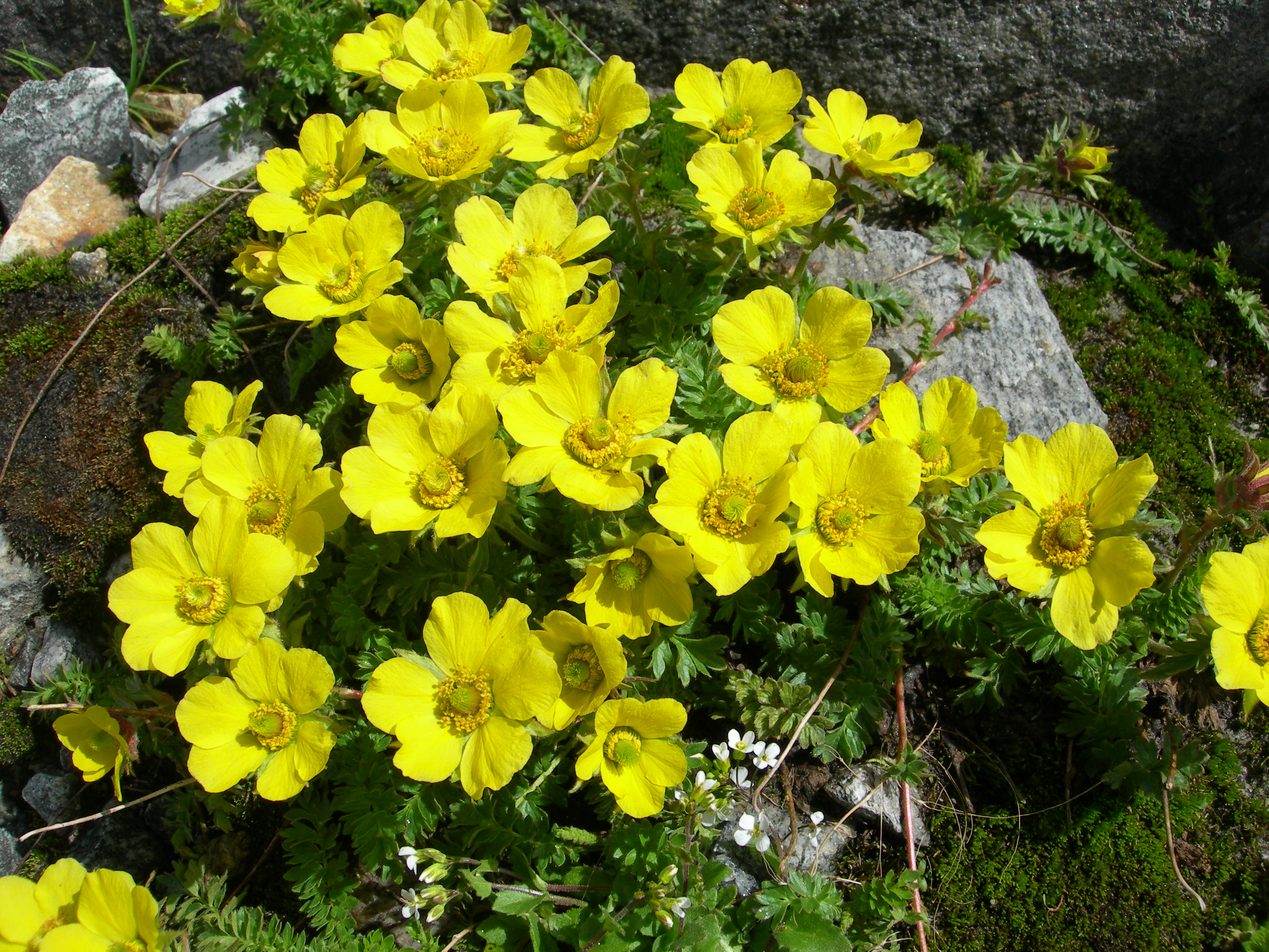 Blühender Petersbart